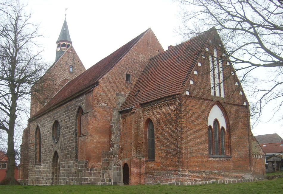 Nikolaikirche in Dassow im Landkreis Nordwestmecklenburg.